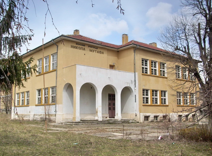 Село Ковачевец, община Попово. Сградата на вече закритото основно училище.